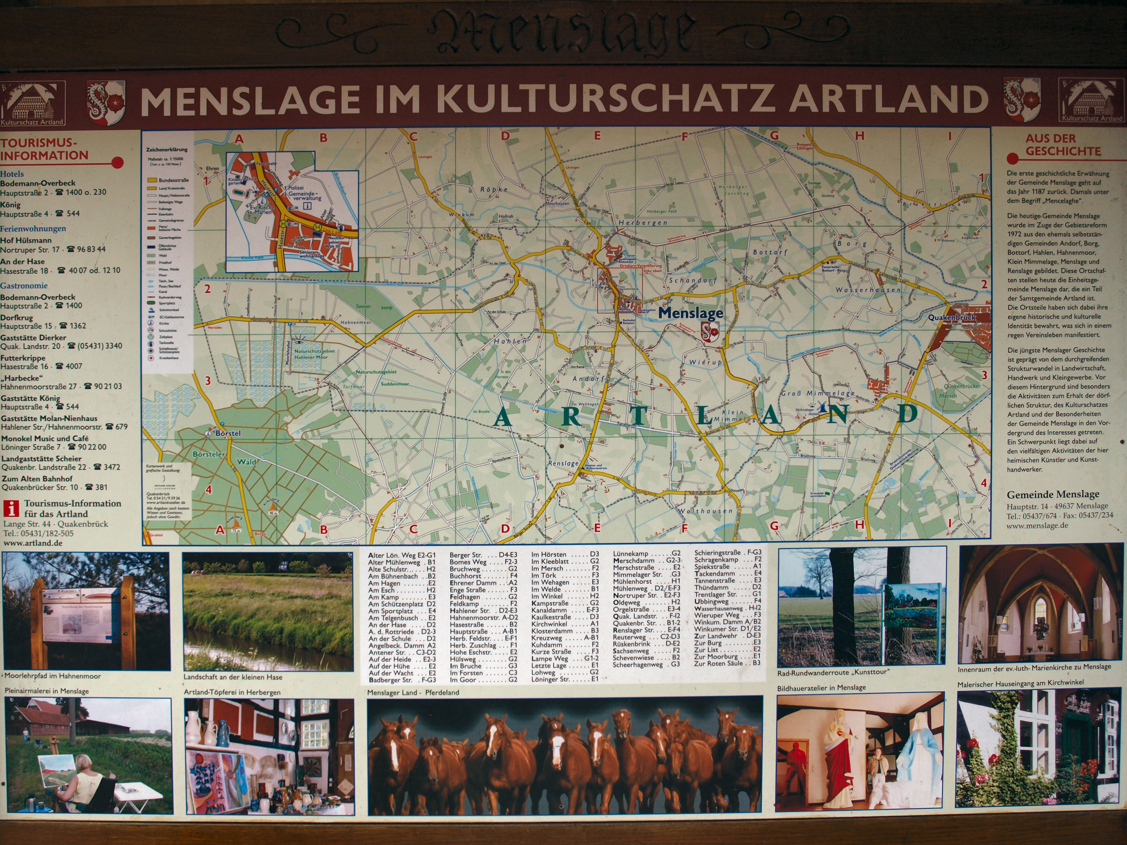 Abbildung eines Ortsplans und touristischer Informationen in Menslage.